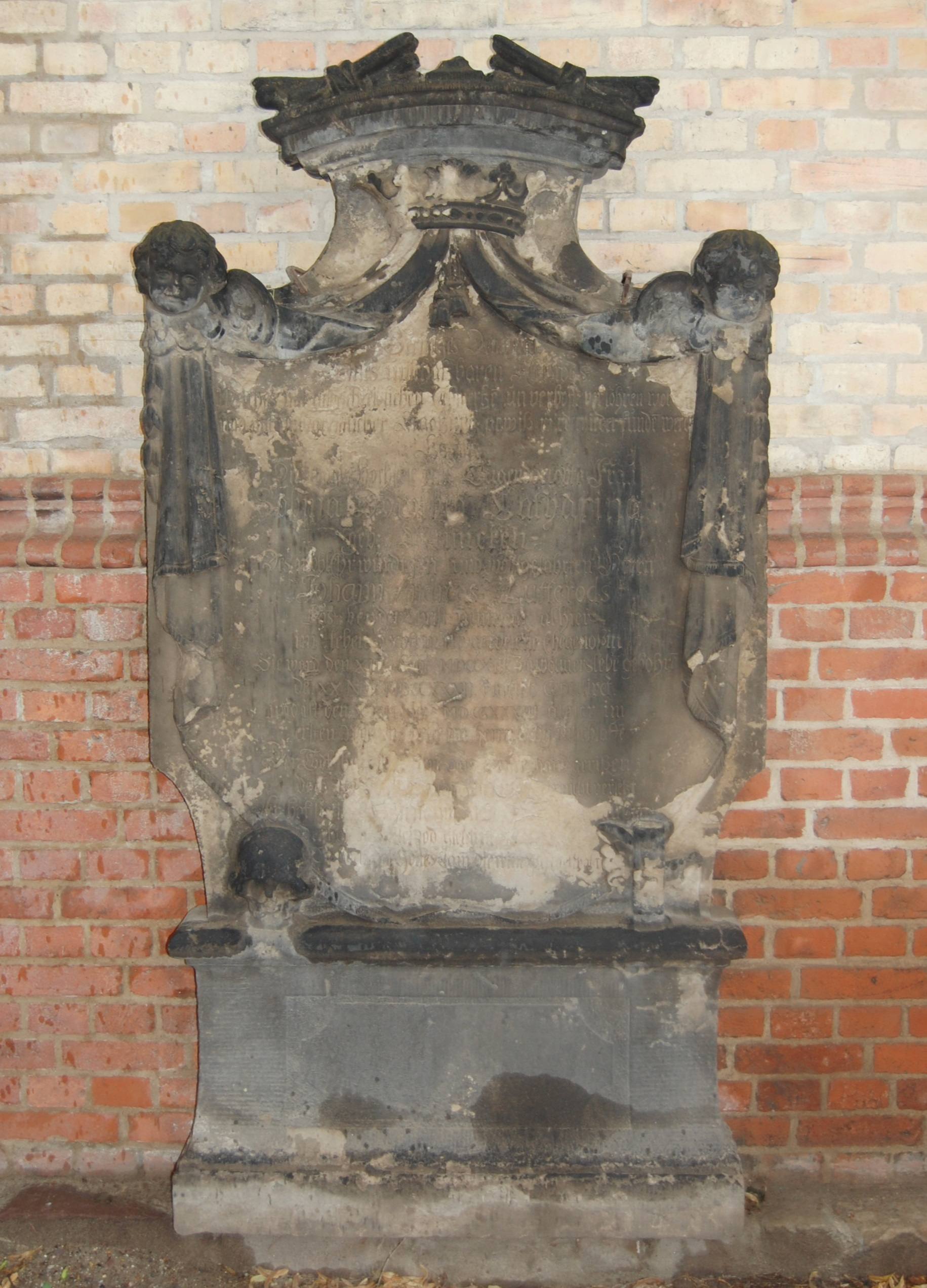 barocker Grabstein an der Ostseite der Sankt-Gertraud-Kirche Magdeburg Salbke